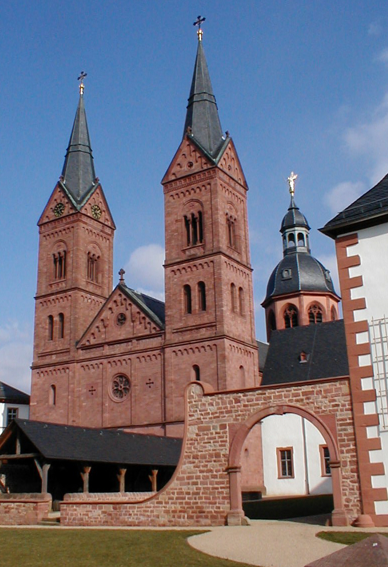 Seligenstadt, Einhard-Basilika, Foto selbst aufgenommen am 12. März 2006, GNU-FDL